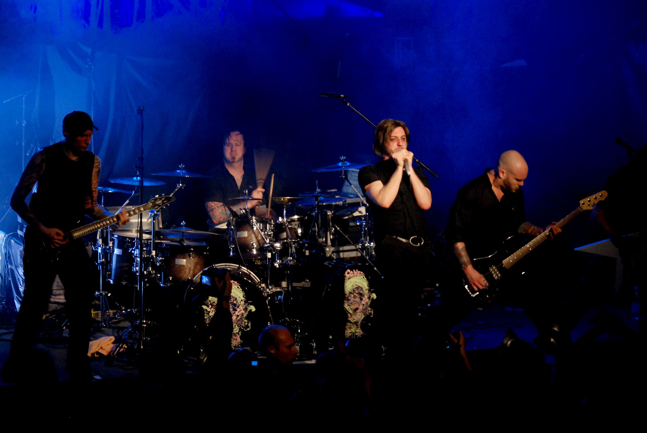 Caliban podczas koncertu w Klubie Studio w Krakowie